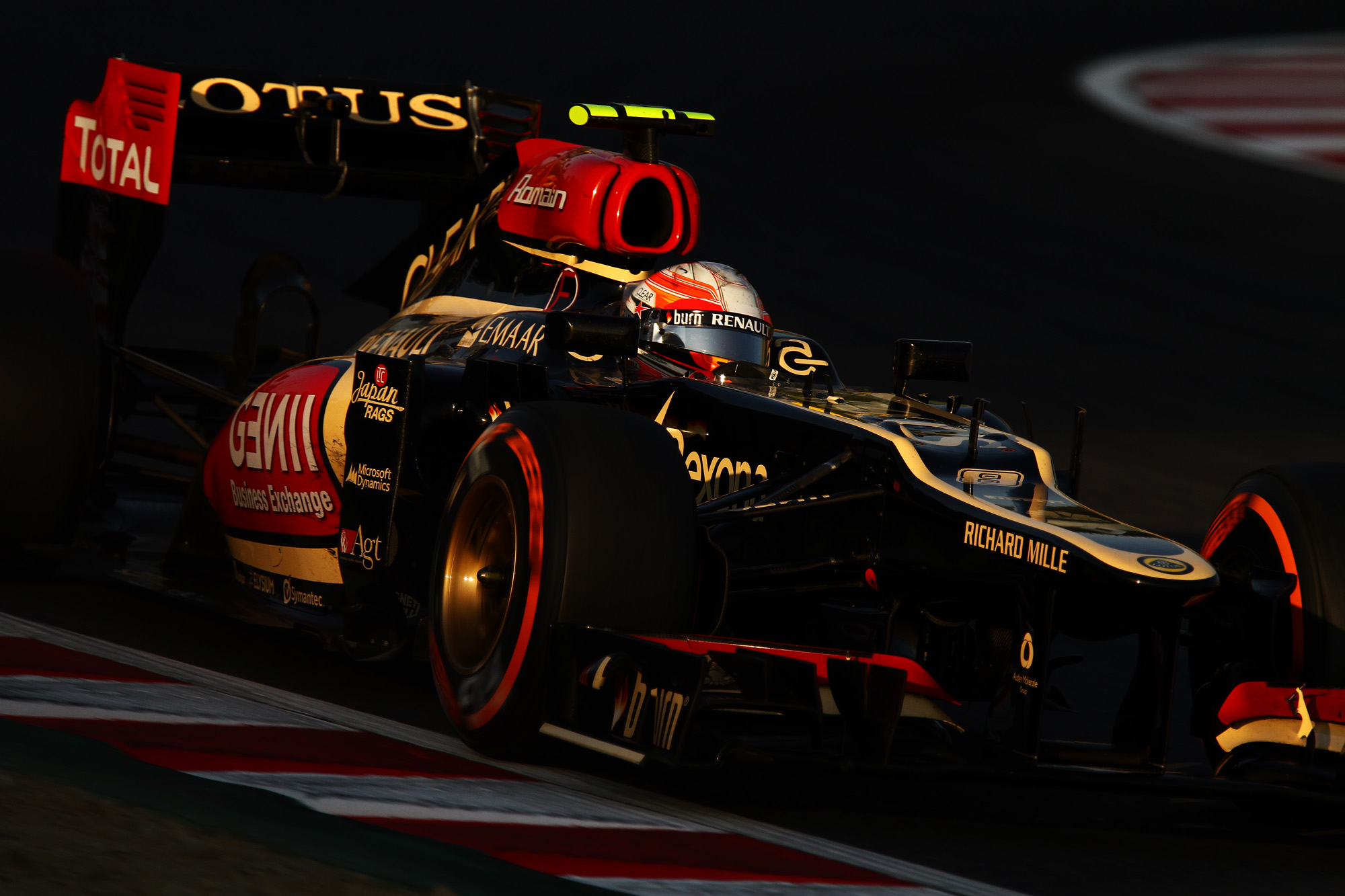 2013.10.13 F1 Rd.15 Suzuka Final, Lotus F1 Team (E21) #8 Romain Grosjean [IMG_2083ks]